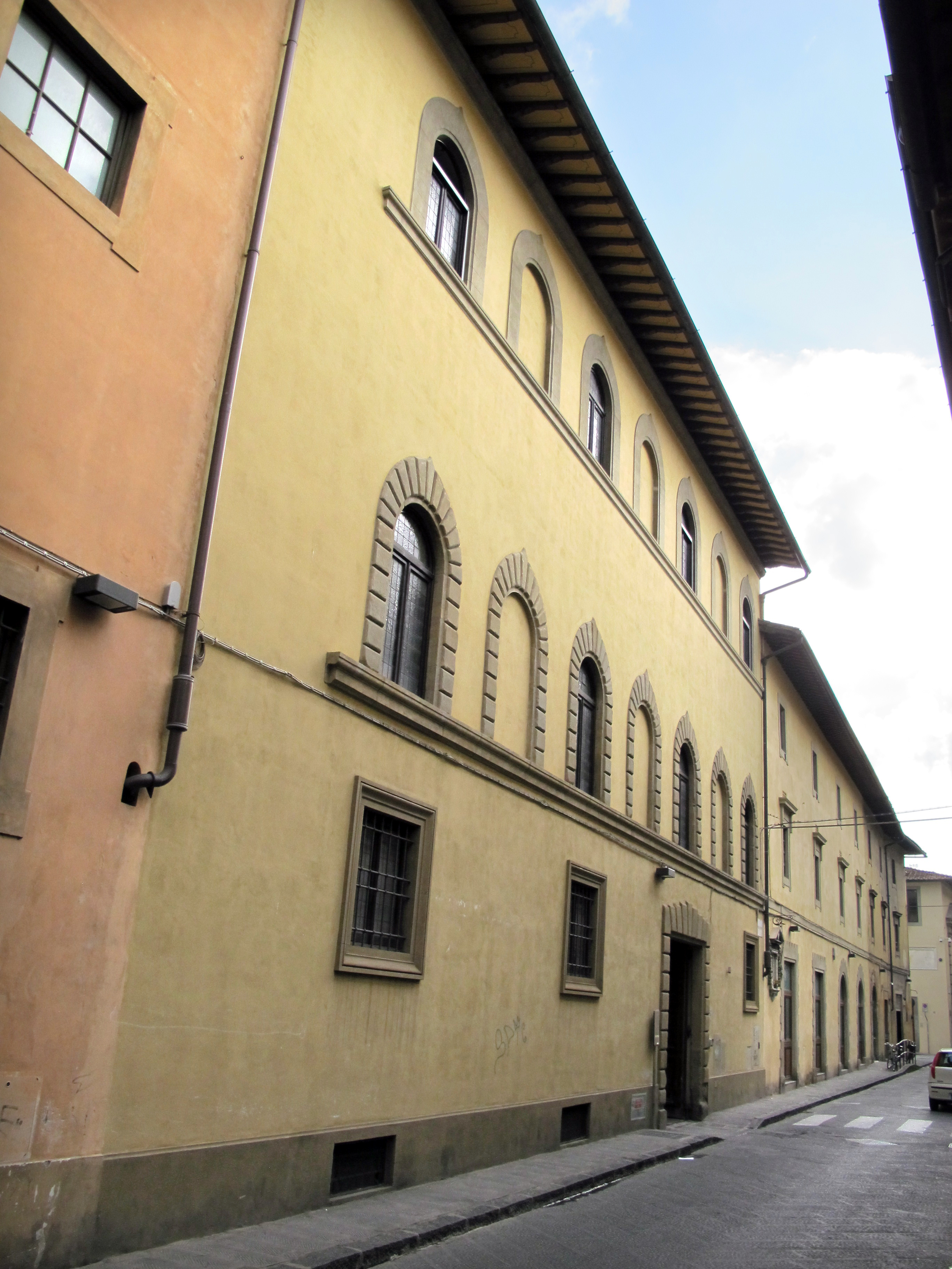 Borgo Pinti, Firenze